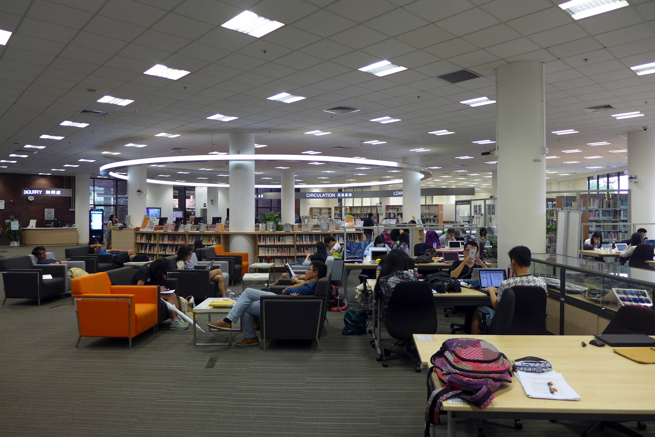 Pao Yue-kong Library Podium Floor